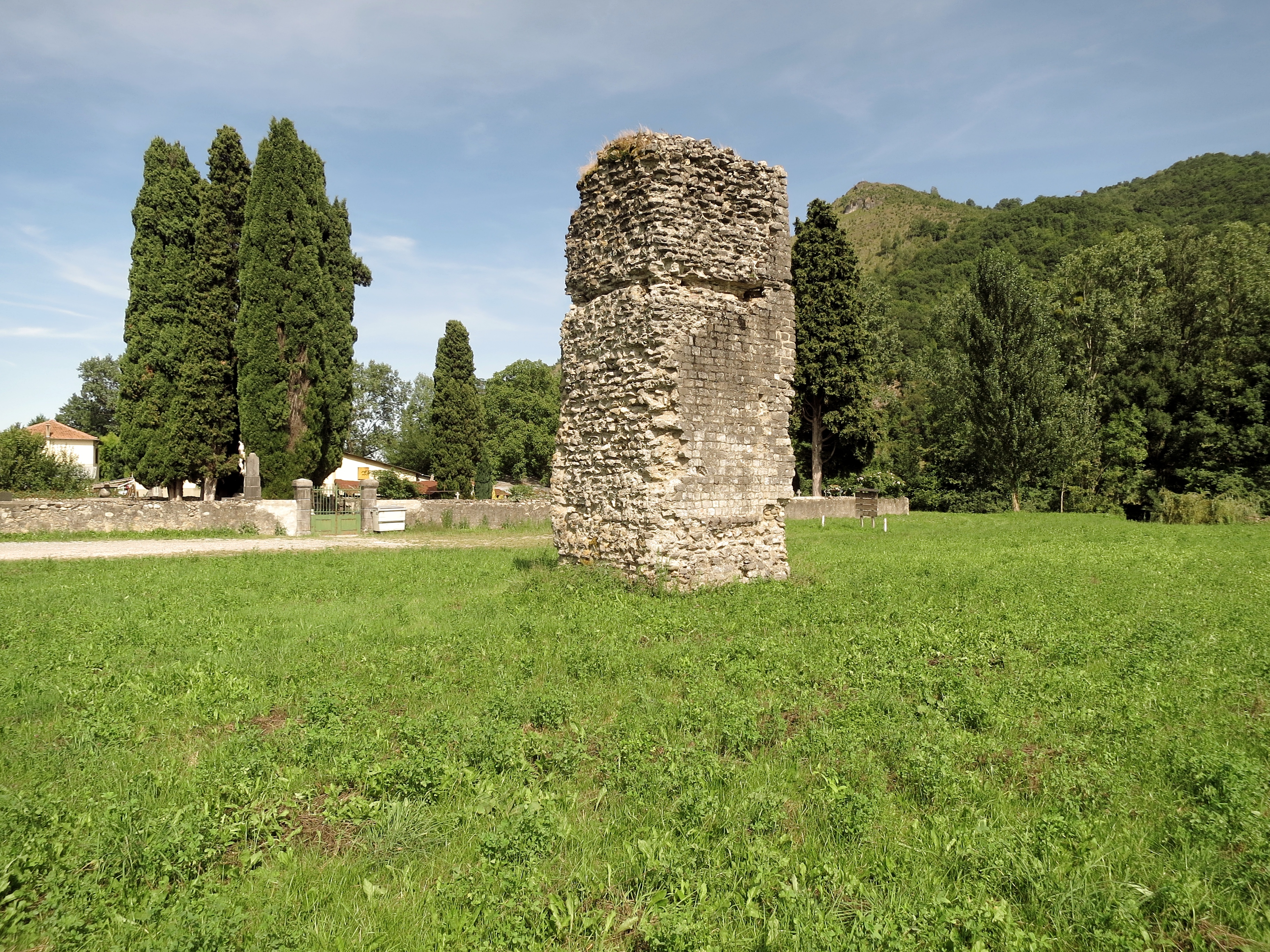 Moulis (Ariège, France) - Pile de Luzenac et cimetière.